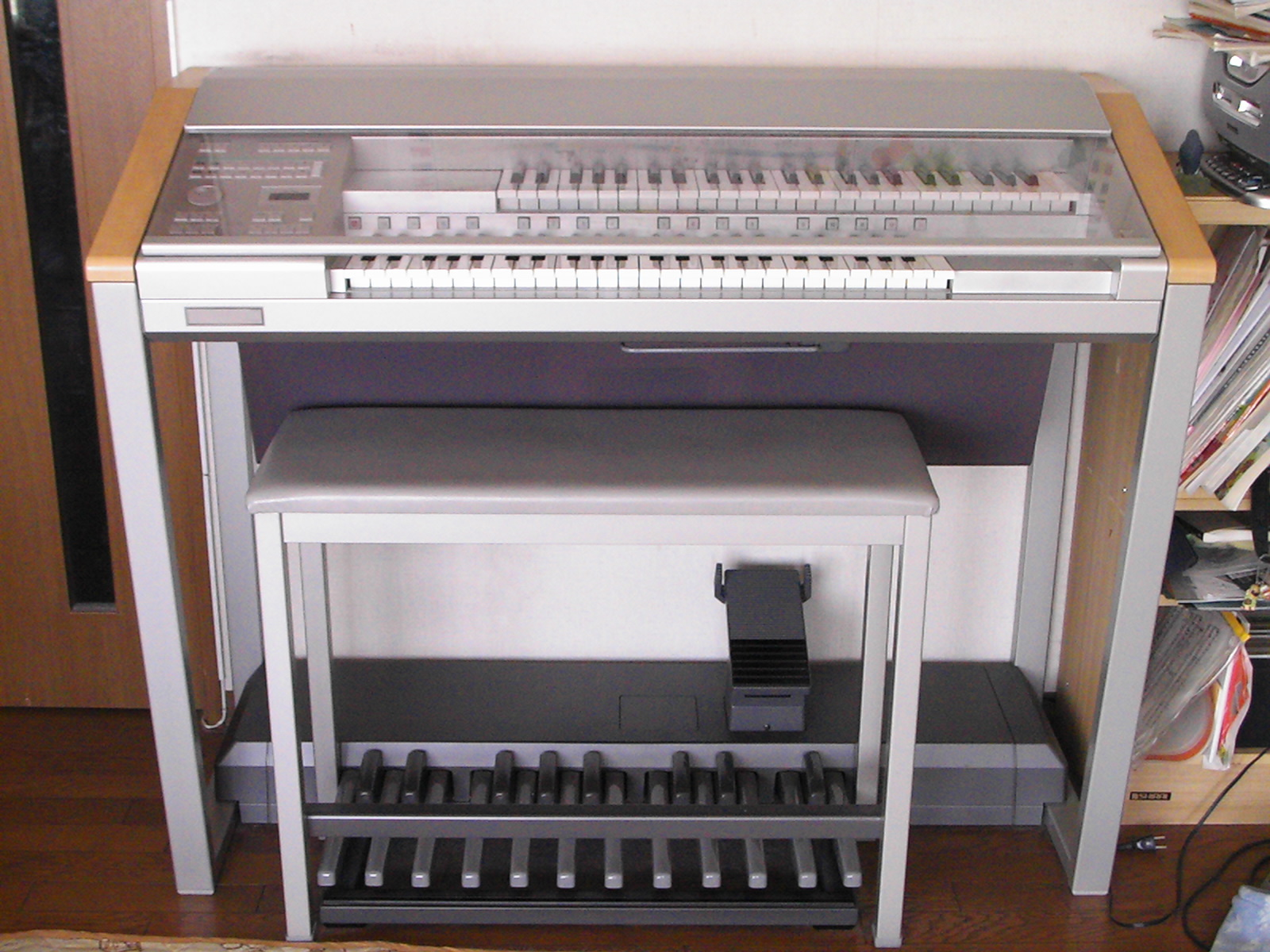 エレクトーンSTAGEA ELS-01